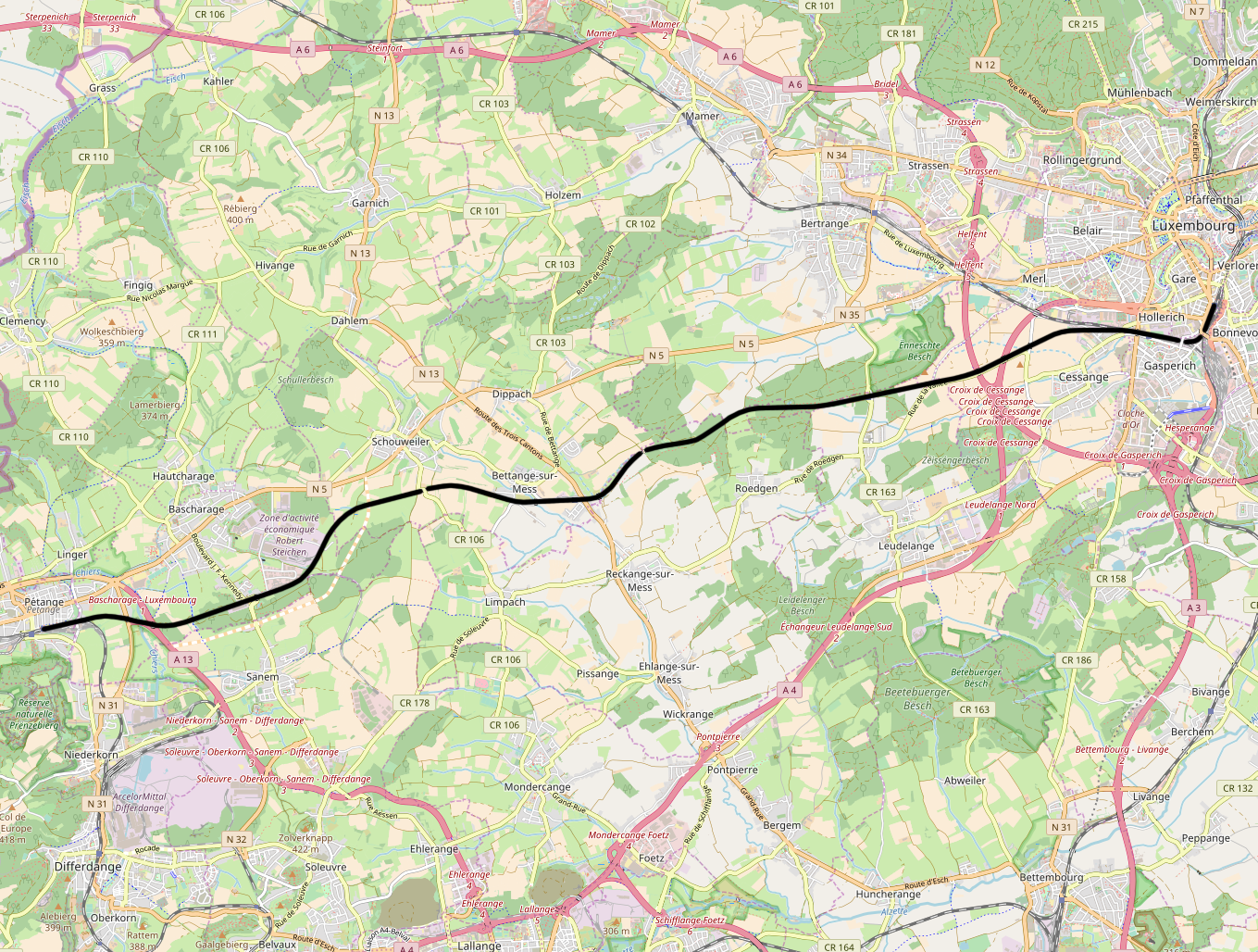 CFL line 7, Luxembourg - Pétange